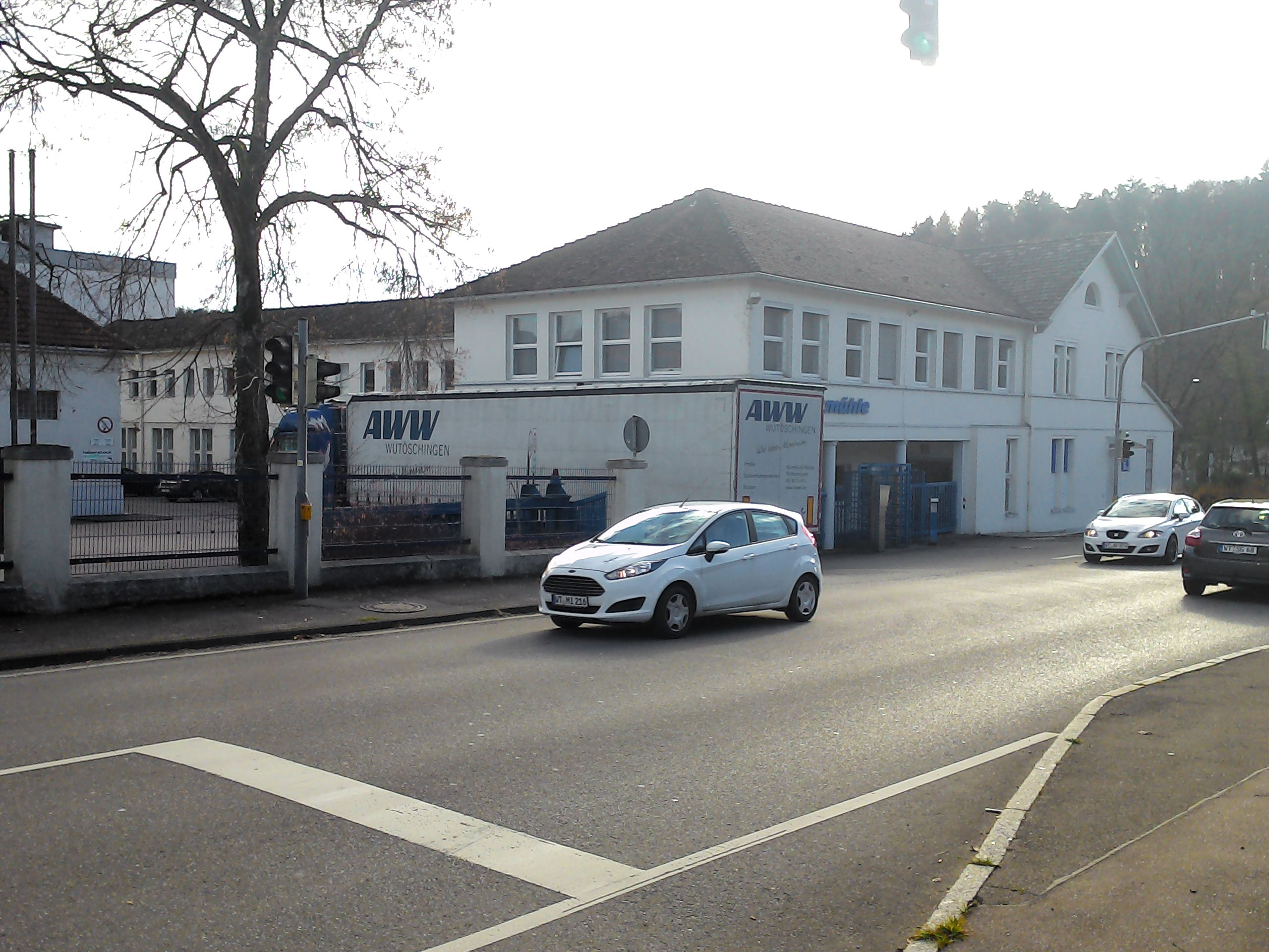 Textilunternehmen Lauffenmühle, Lauchringen — Einfahrt eines Trucks der Aluminium-Werke Wutöschingen (AWW). Landkreis Waldshut, Baden-Württemberg.